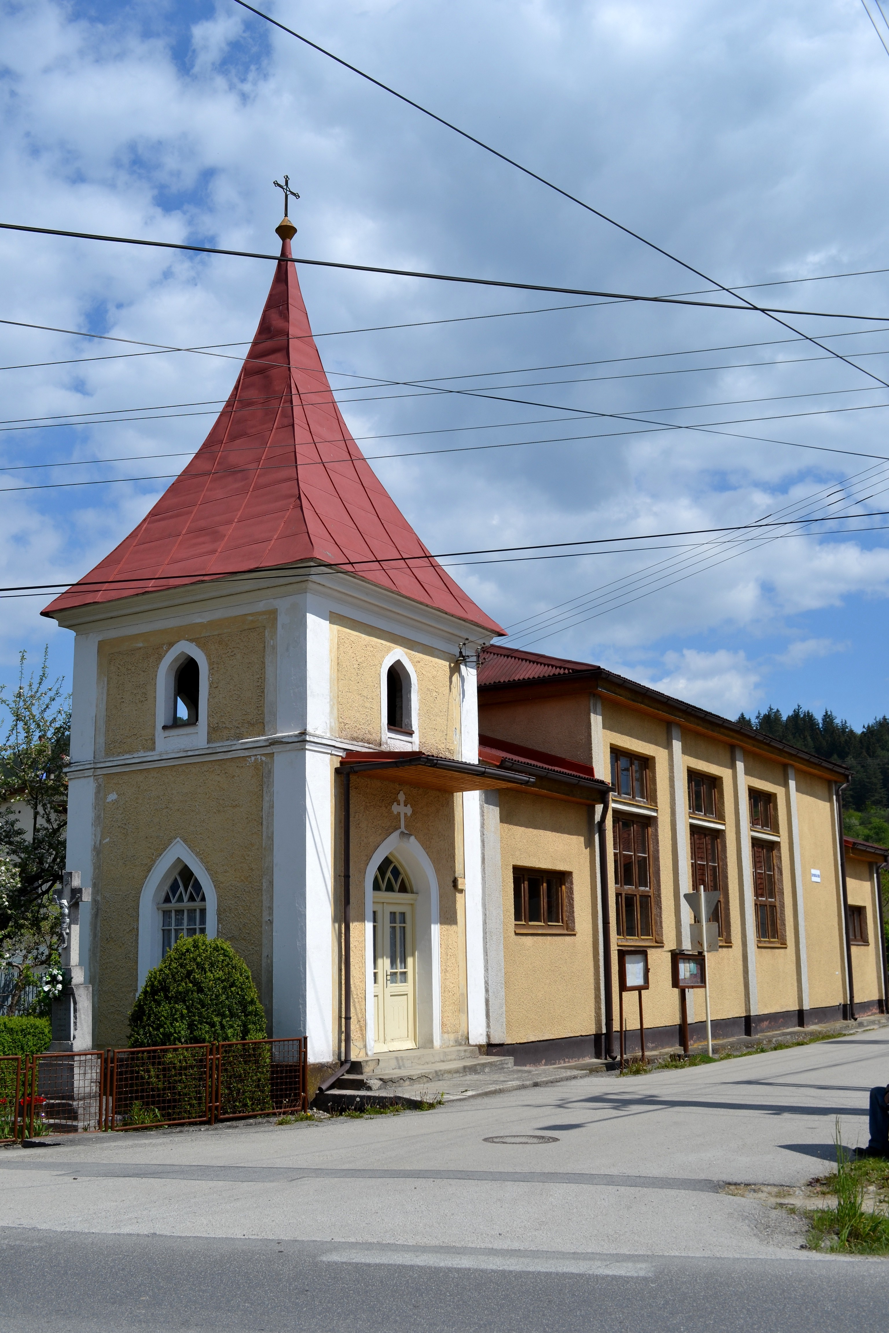 Porúbka (okr. Žilina), Kaplnka Najsvätejšej Trojice